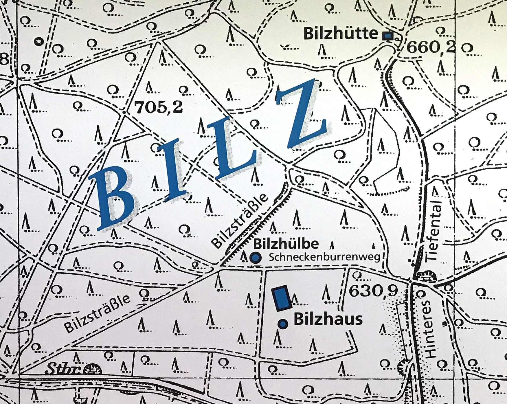 Oberkochen - Lageplan der Bilz mit Bilzhaus, Bilzhülbe und Bilzhütte